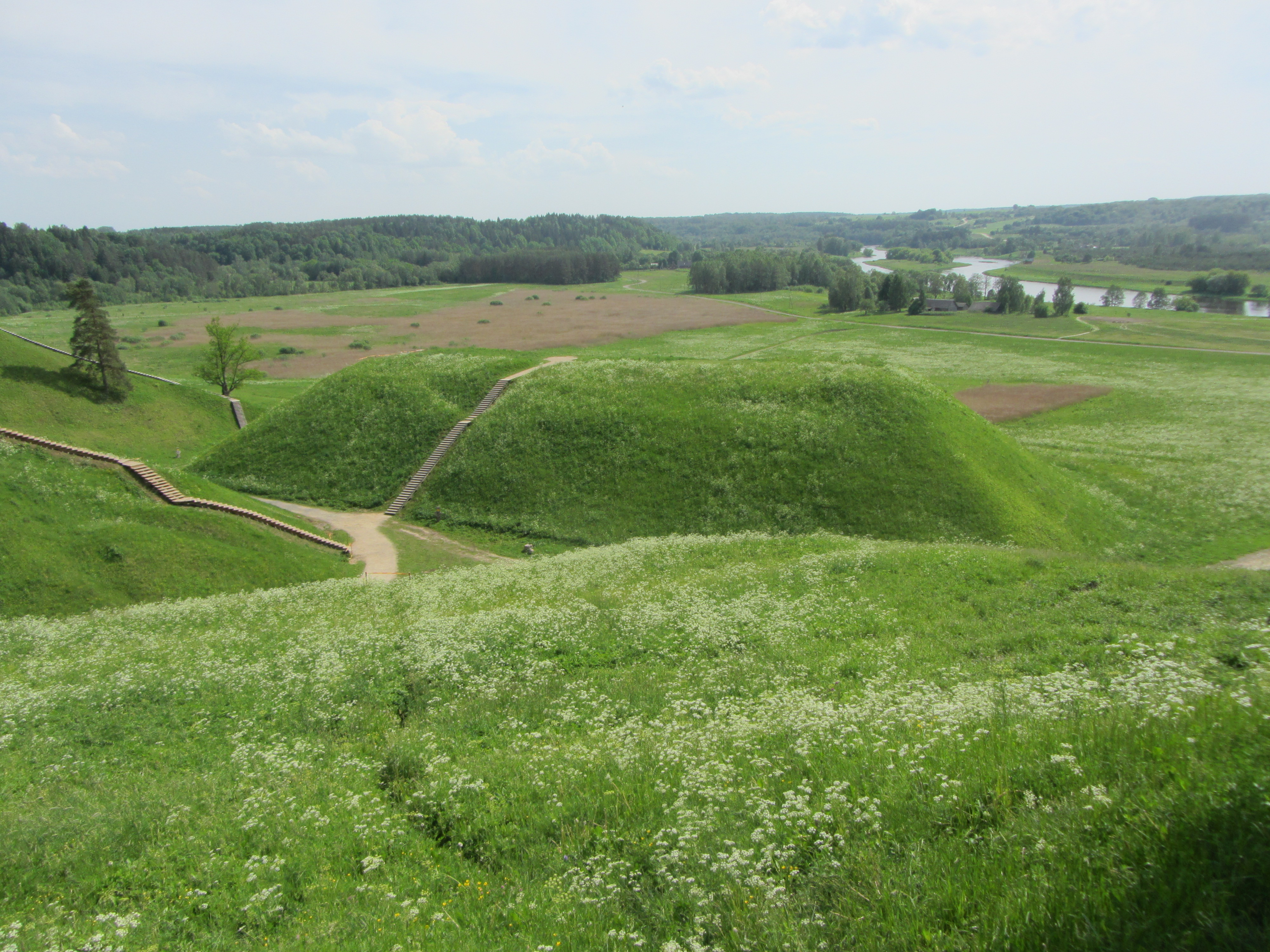 Kernavė 19172, Lithuania